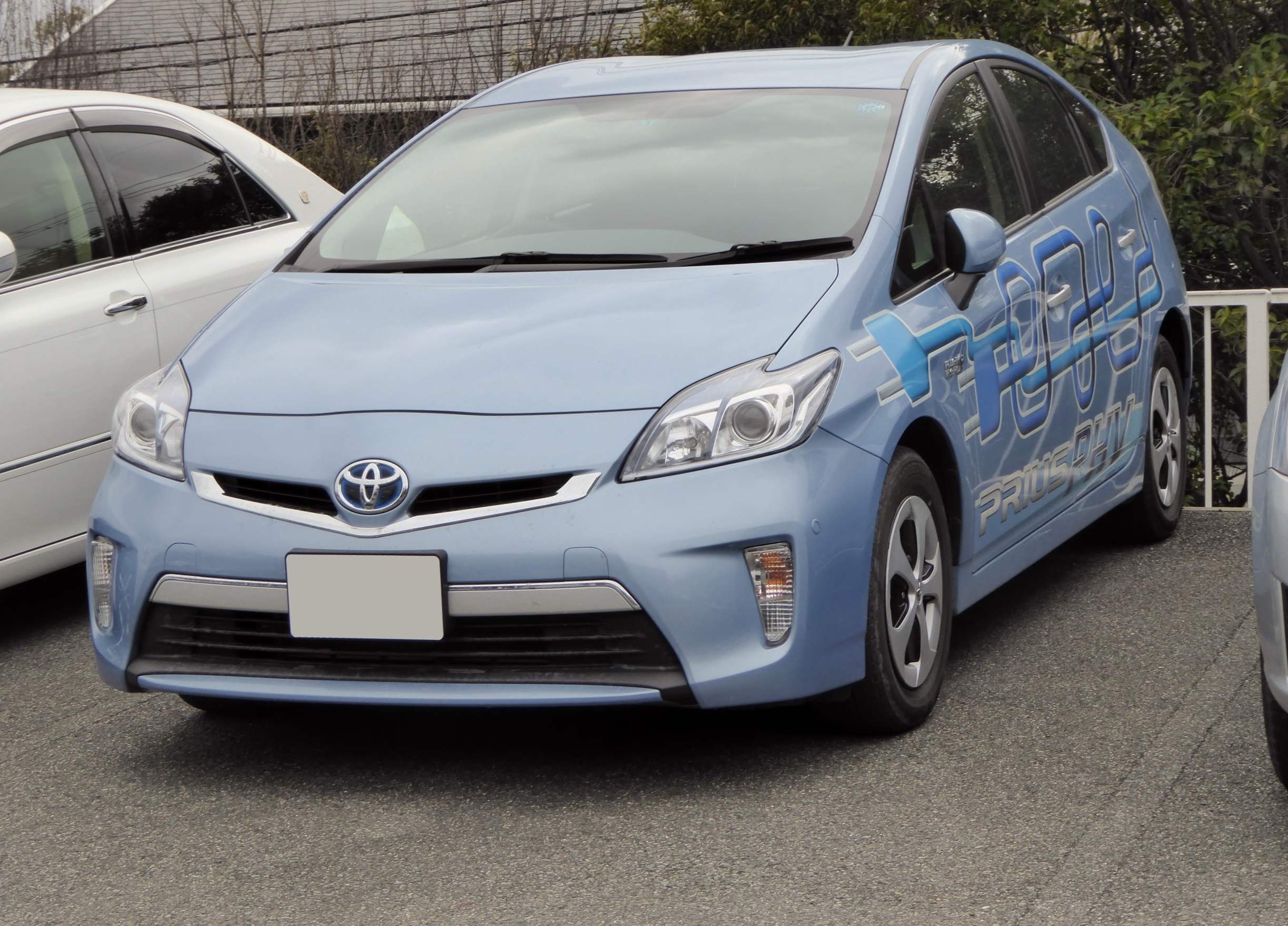 ZVW35型トヨタ・プリウスPHV Gをフロントから撮影。